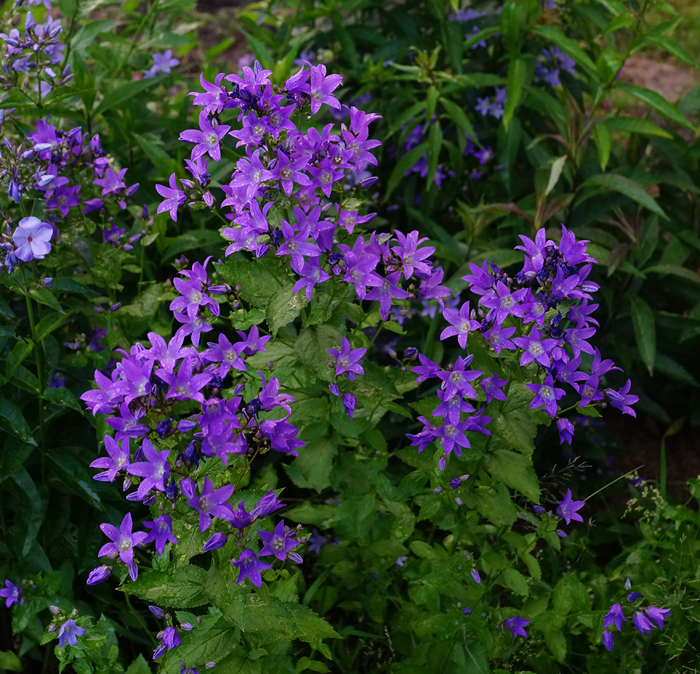 Россия. Владимирская область